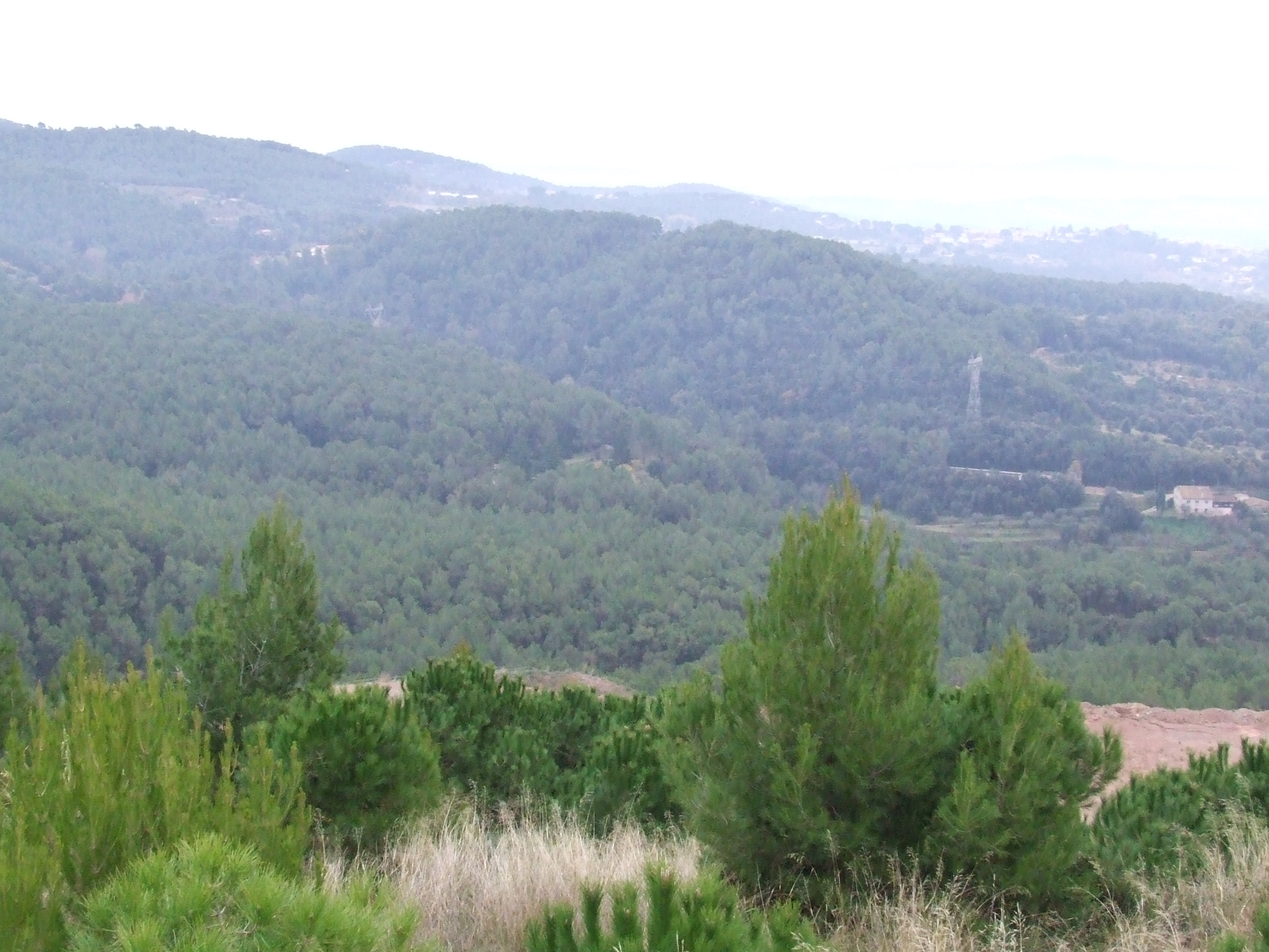 Torrent de la Font de la Guilla (Bigues, Bigues i Riells, Vallès Oriental)